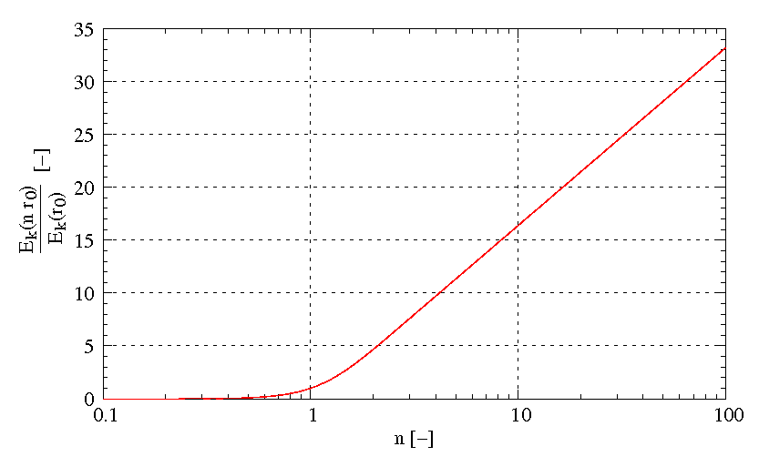 Kinetische Energie des Fluids als Funktion der Vielfachheit des Kernradius in einem Oseenschen Wirbel